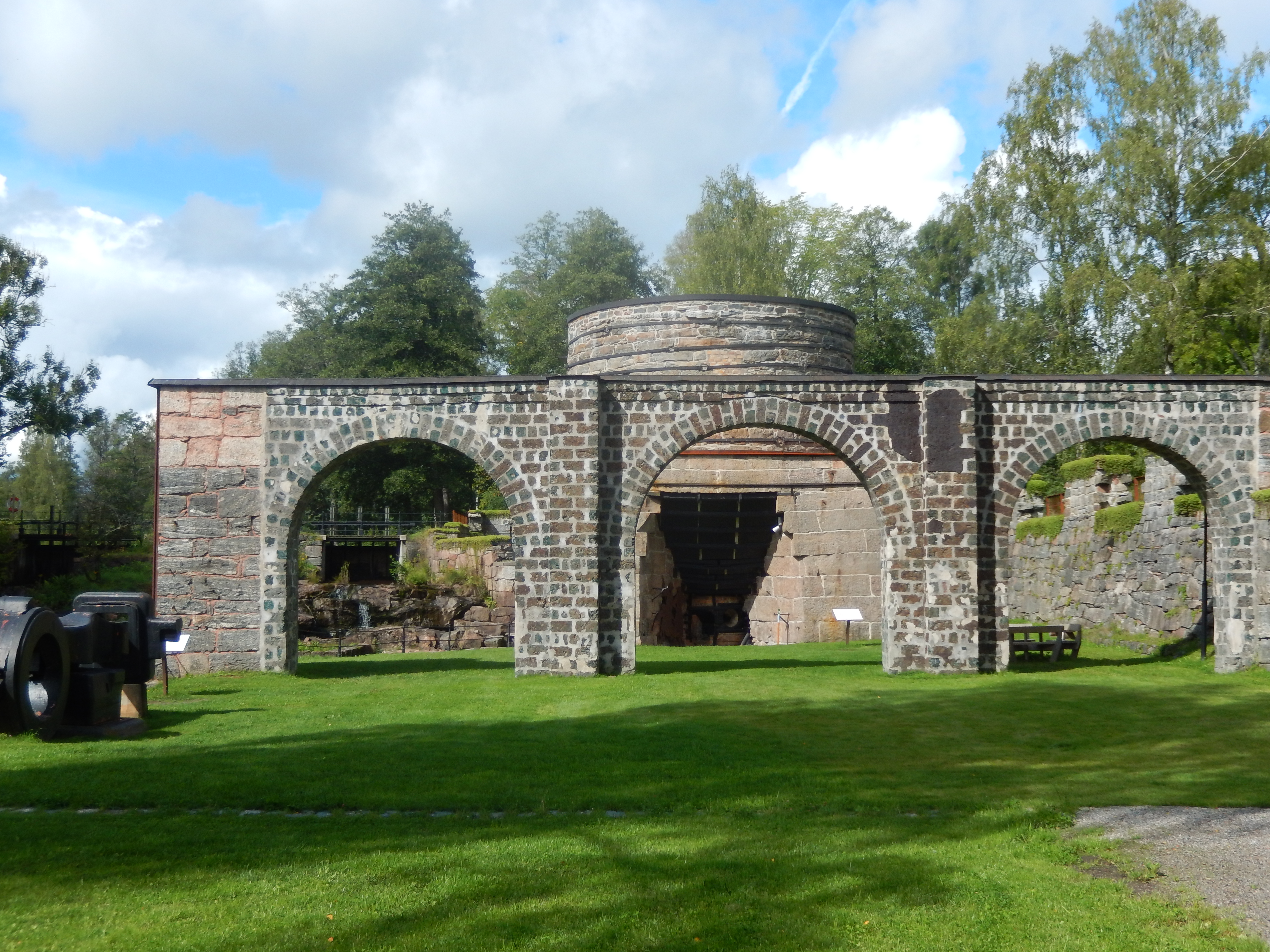 Borgviks museum. Grums, Grums. Från 1865.